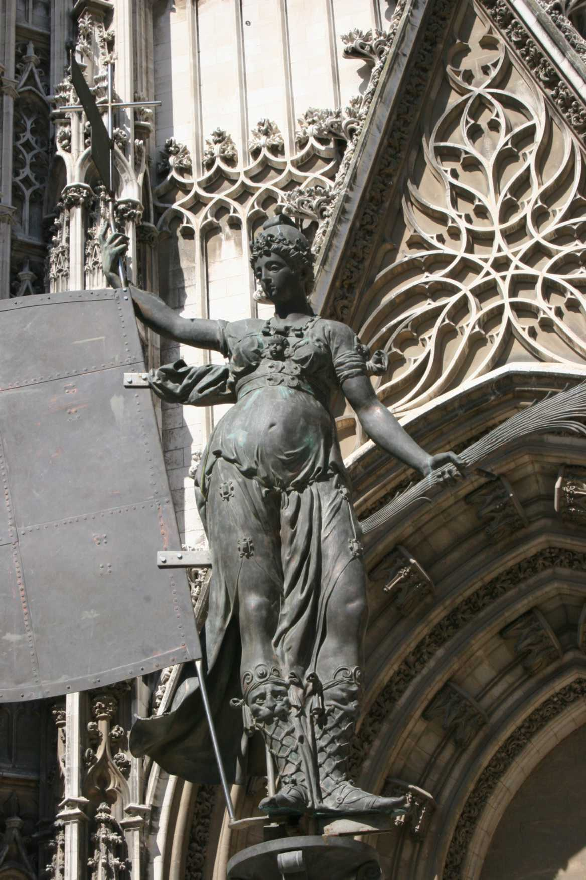 El Giraldillo que corona la Giralda de Sevilla, se observa a la altura del suelo en la Catedral. Realización propia. Anexo : Debería llamarse Giraldilla , por ser una Diosa o Señora . Cosas del patriarcado . La Sibila era la madre del supuesto primer poblador de Iberia : Túbal , el cual también es otro nombre del río Ebro . Tenía el don profético , que ejercía subida en una piedra redonda que siempre llevaba consigo . En algunos relatos se lee Sibila Gerófila . Gerófila , Gerardo y otros nombres son en honor al supuesto ( y también ) primer poblador y primer rey de Iberia : Gerión ( Hércules Gerión ) .